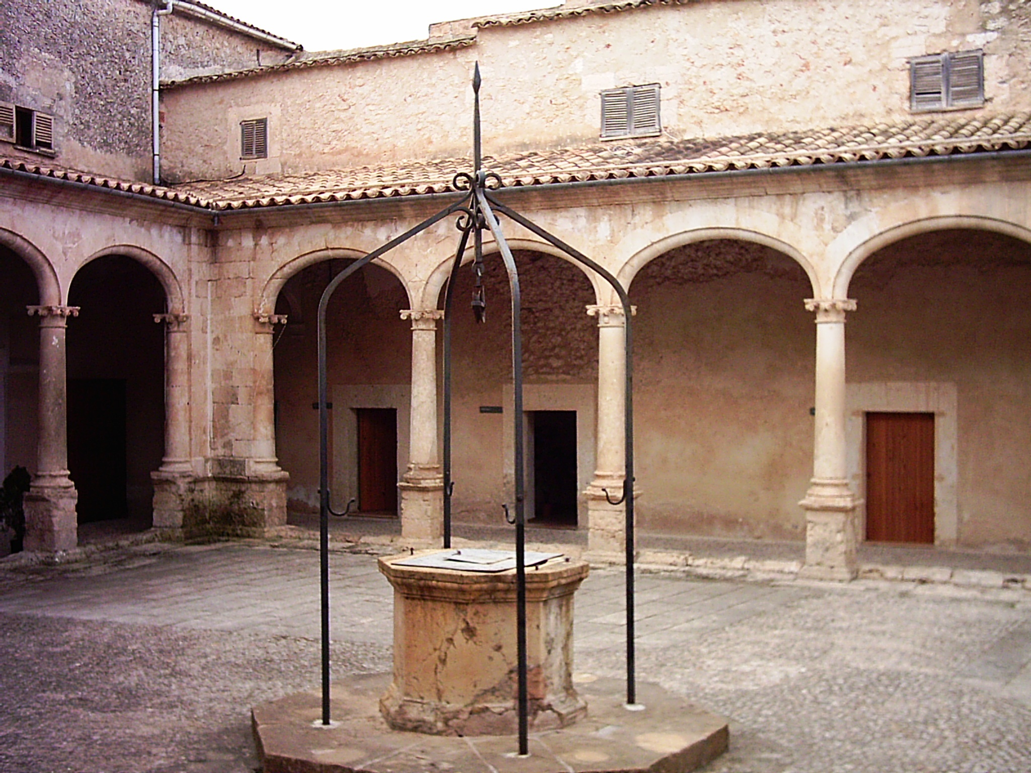 Clàustre de Sant Francesc de Sineu